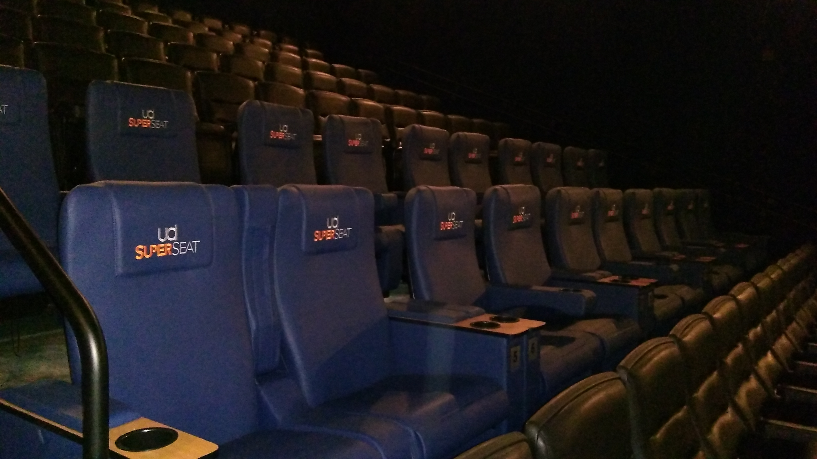 Poltrona UCI Superseat do UCI Jardim Sul de São Paulo, capital